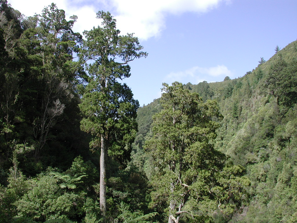 Mature rimu trees in Karapoti Gorge.